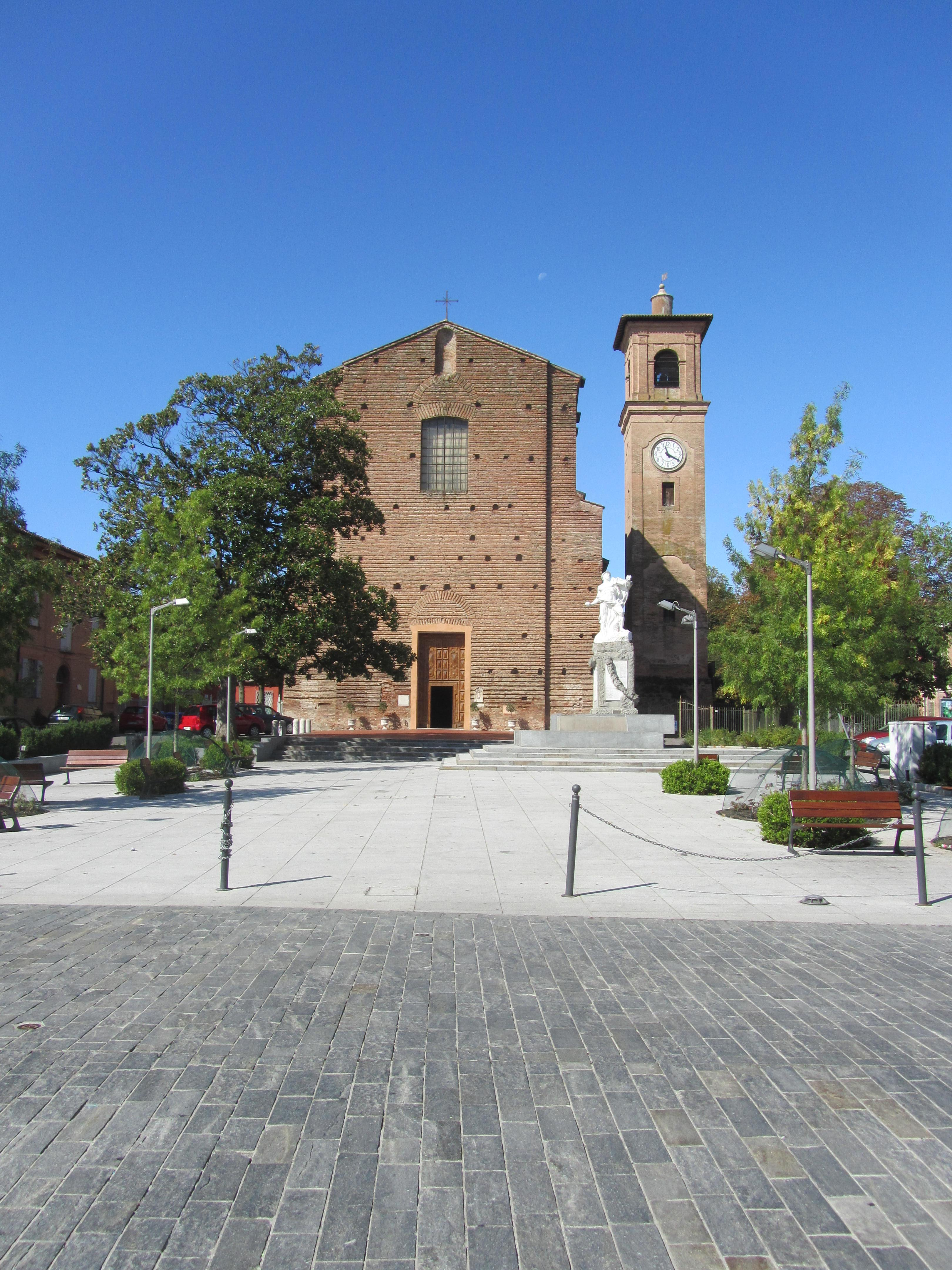 La Chiesa di Santa Maria Assunta a Fabbrico, provincia di Reggio Emilia.